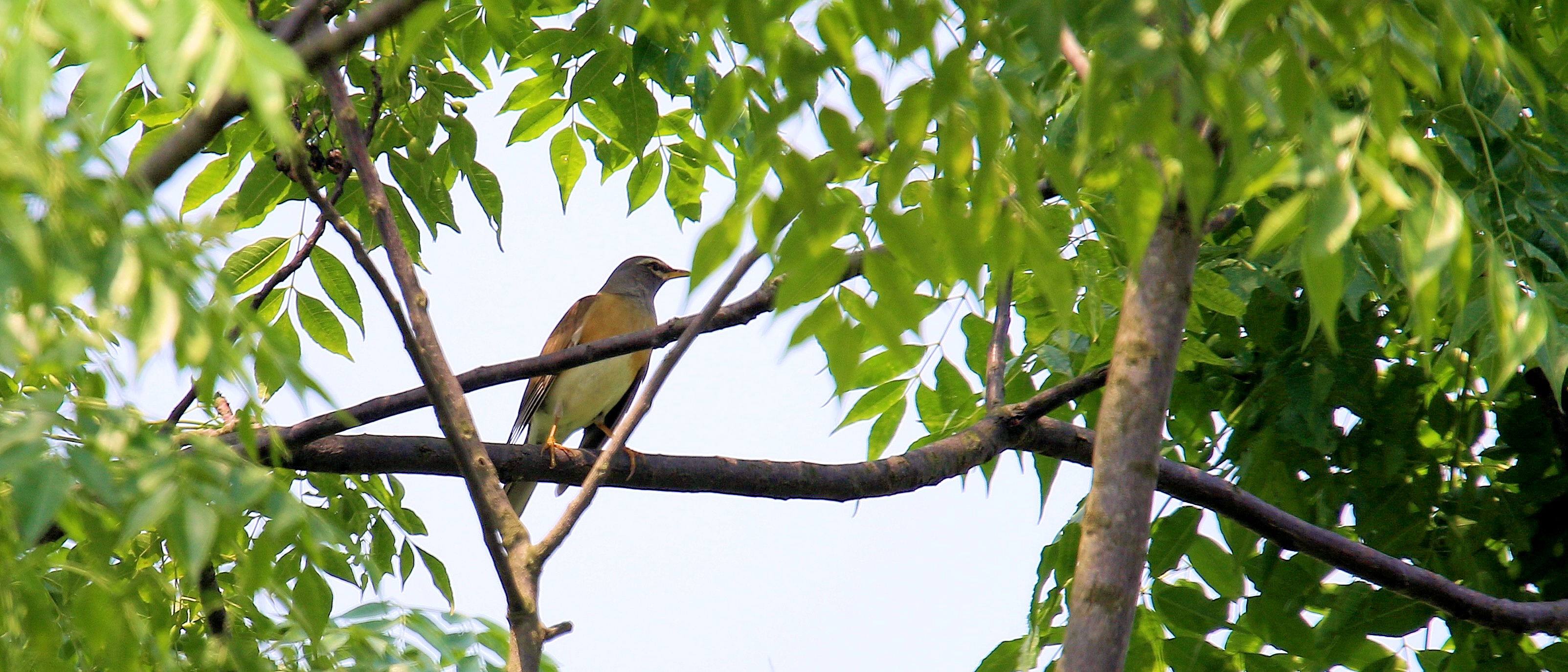 Hoét mày trắng chụp tại Yên Mỹ Hà Nội